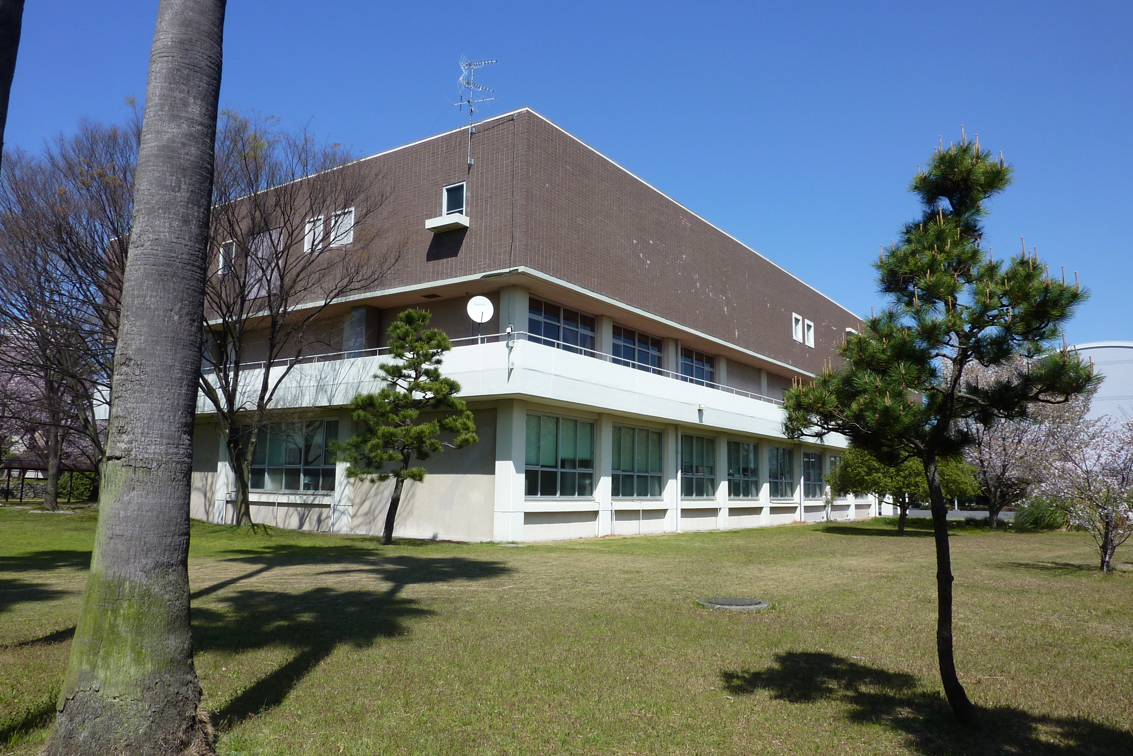 産業技術短期大学１号館（事務局・講堂）